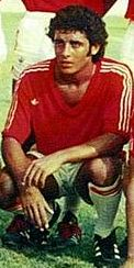 Nejib Ghommidh